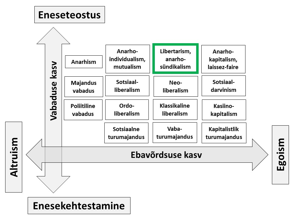 Libertarismi positsioon sotsiaalse korra mudelis